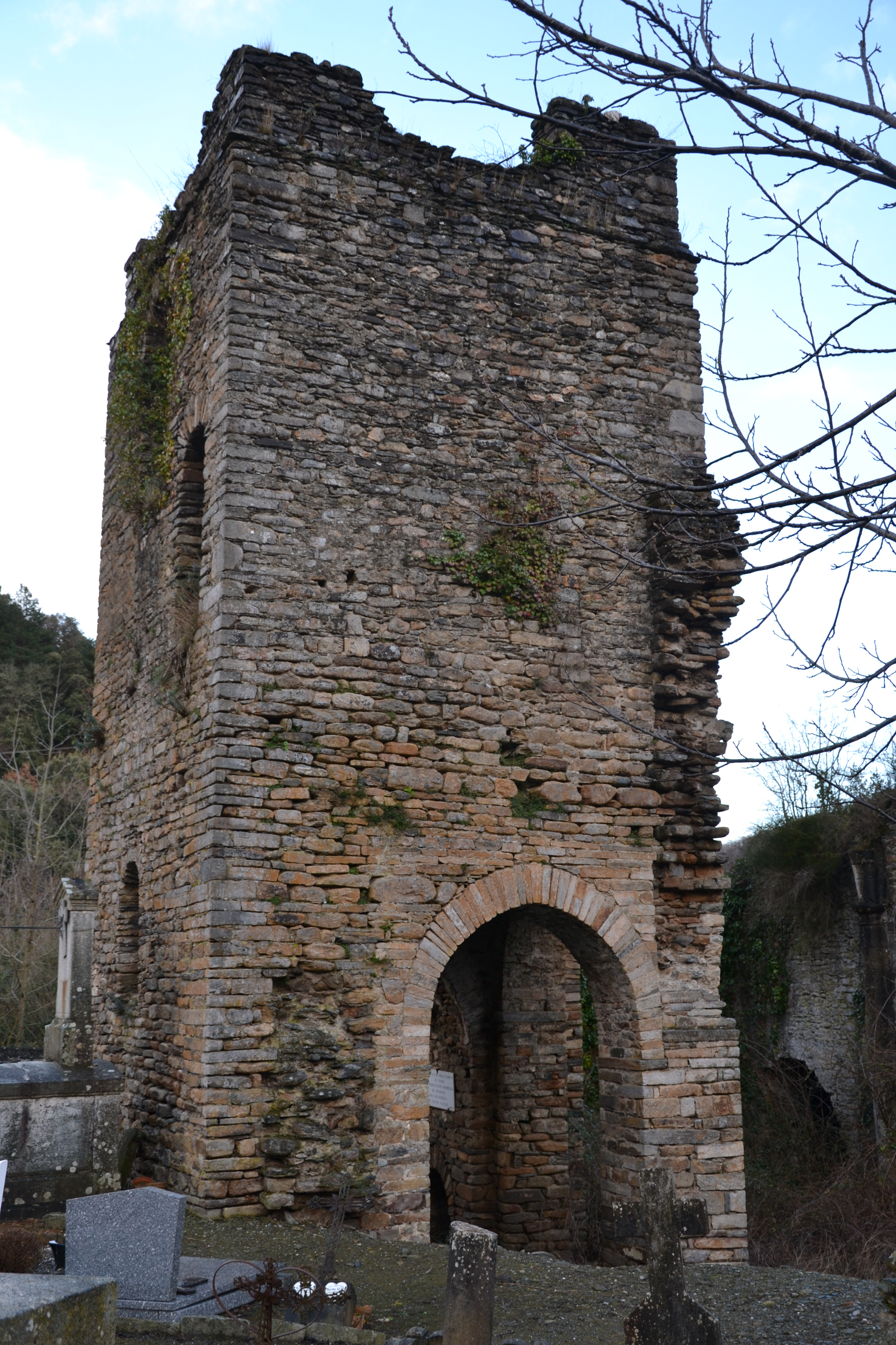 ancienne église paroissiale des communes de La Tourette-Cabardès et de Miraval-Cabardès